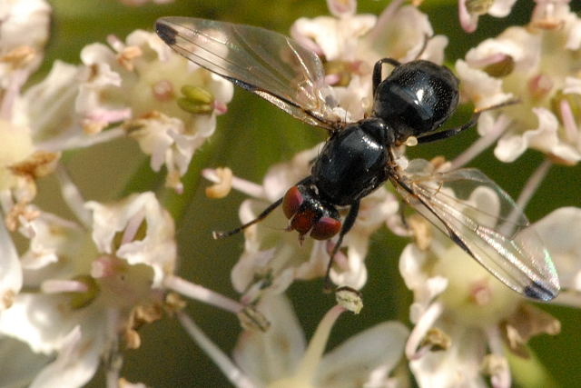 Seioptera vibrans from Commanster, Belgian High Ardennes .